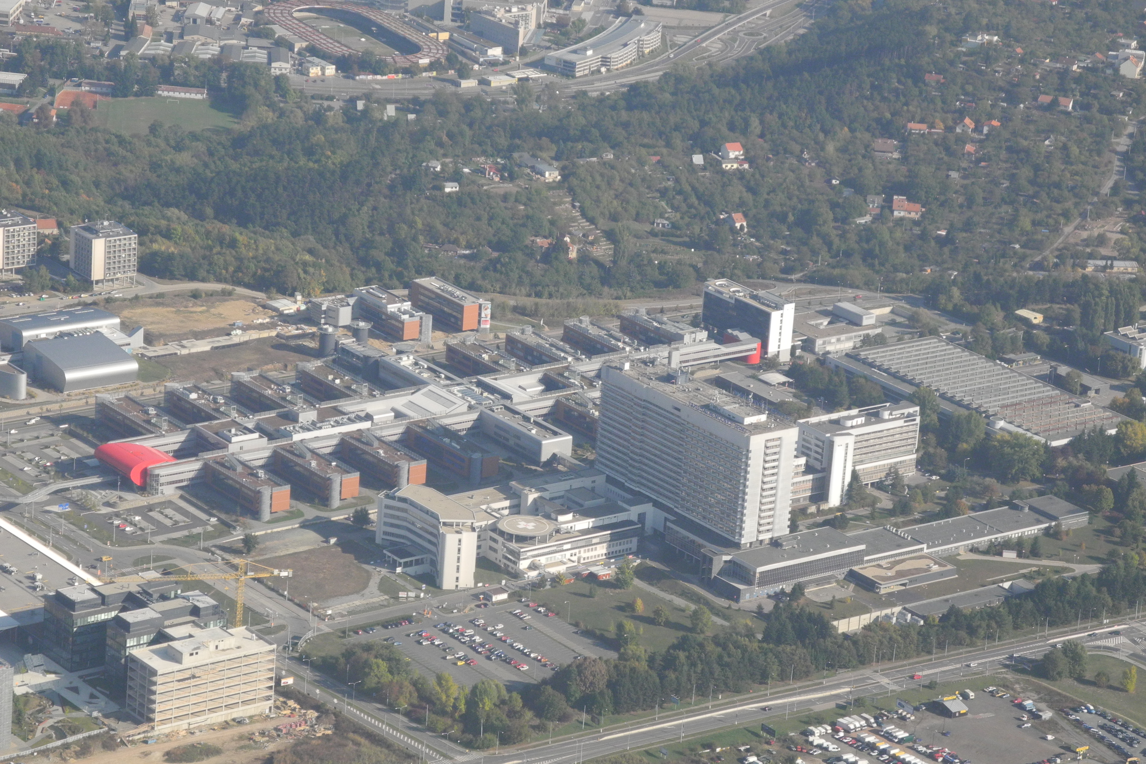 Brno